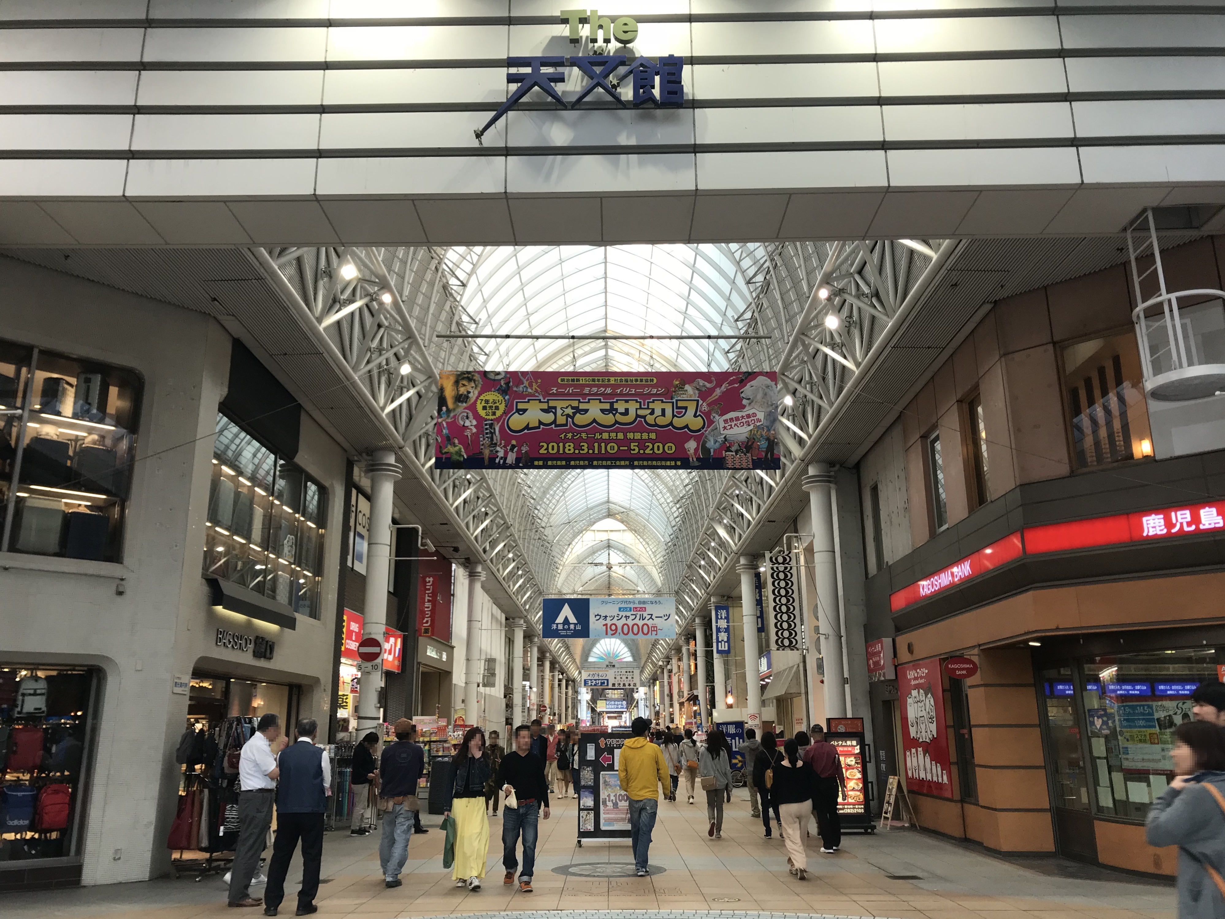 天文館本通りアーケード